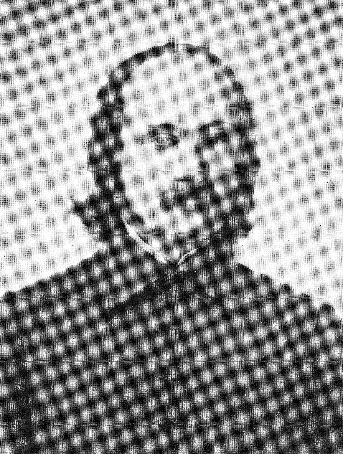 Zenon Świętosławski (1811-1875)